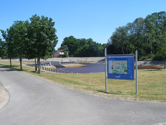 Blick auf die Marina Schlabendorf am See vom Ufer aus